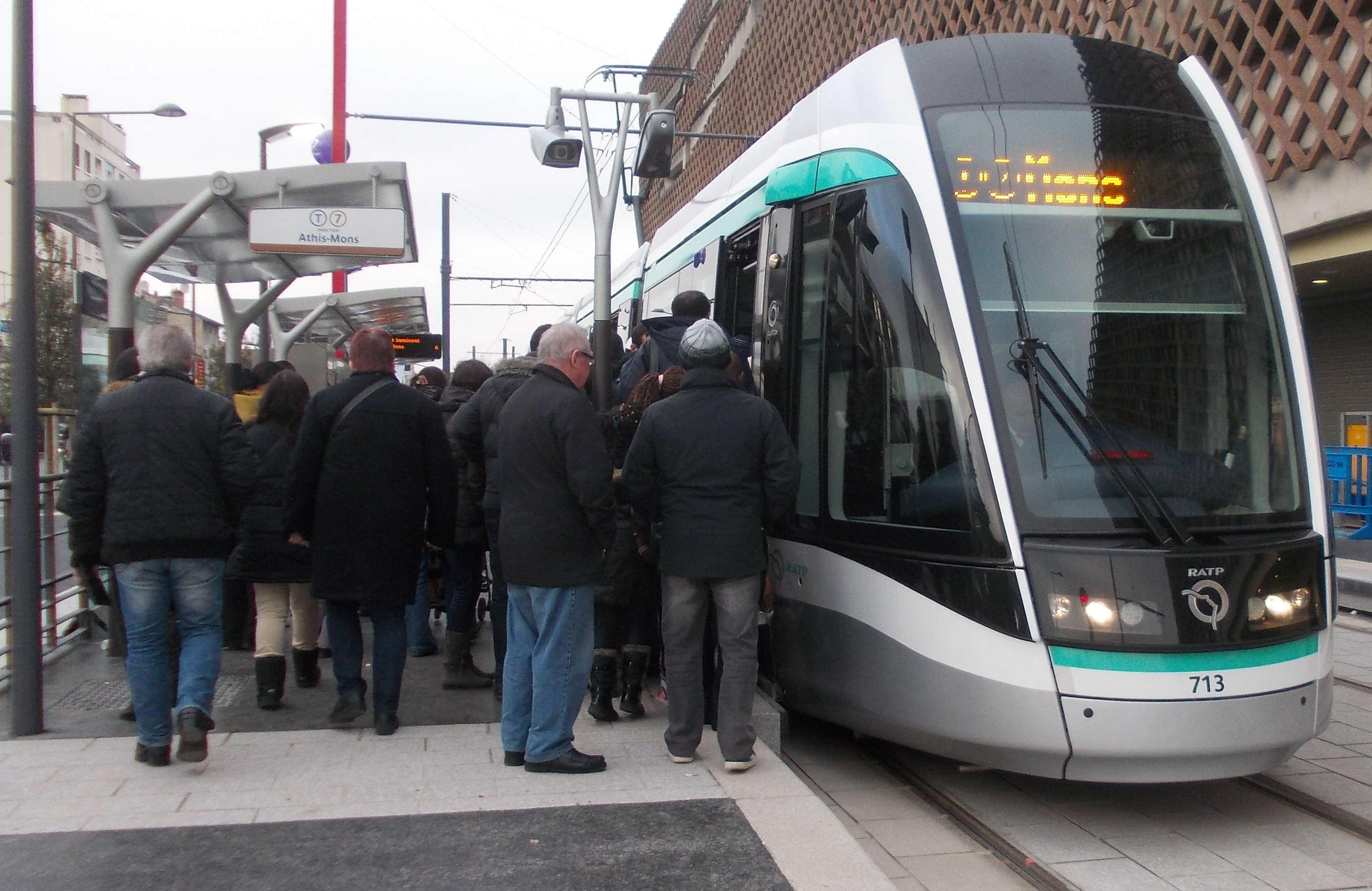 Villejuif. Tramway ligne 7. Affluence à la station Villejuif - Louis Aragon le jour de l'inauguration le 16 novembre 2013.